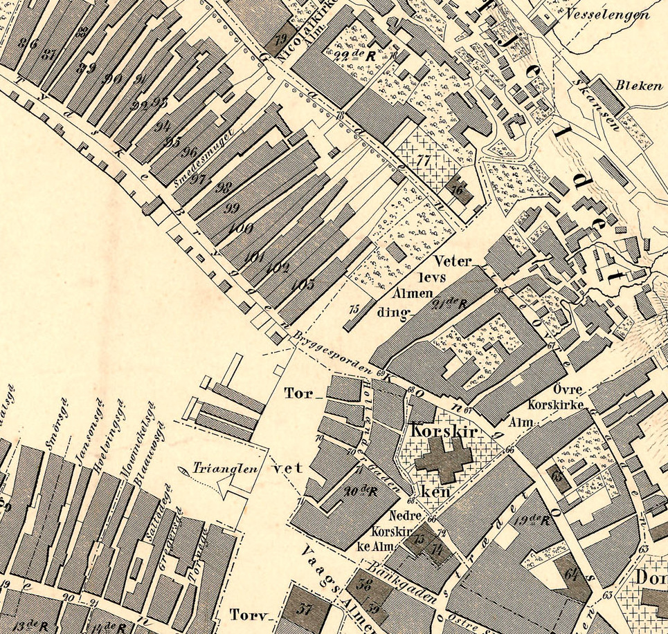 Kart over Bergen med Omegn.